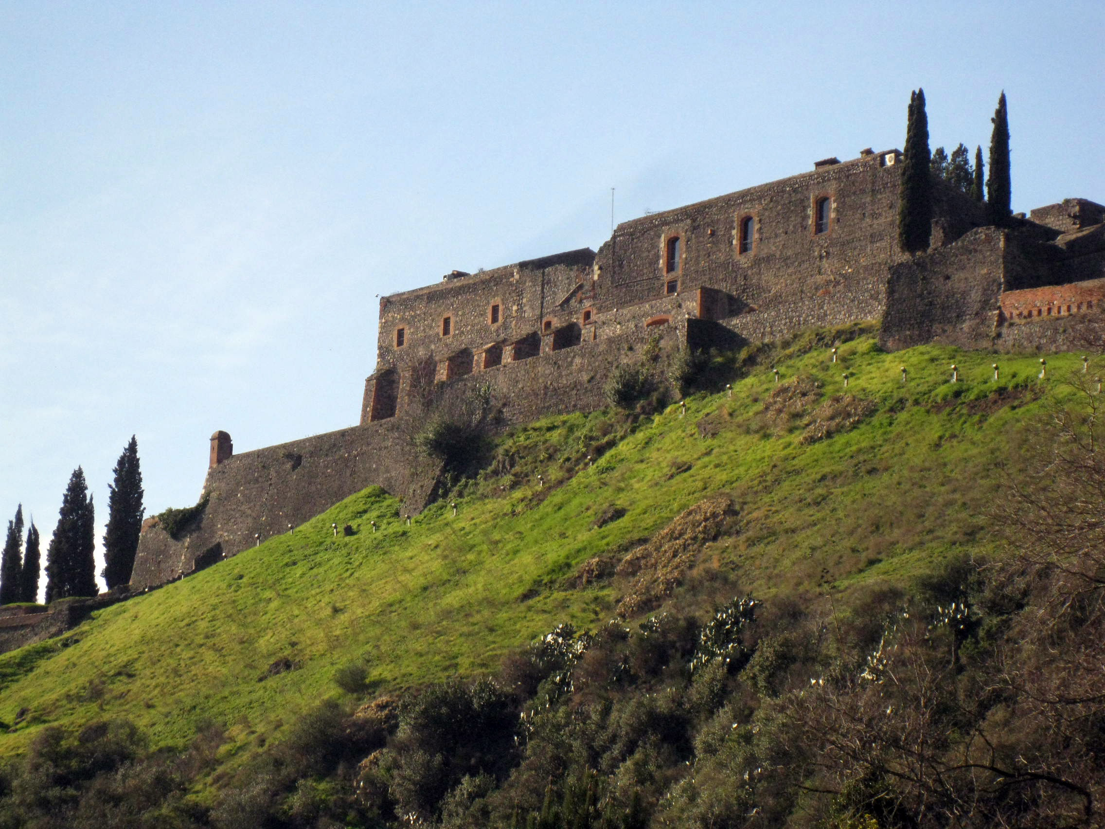 Muralla i castell (Hostalric) Object location41° 44′ 38.43″ N, 2° 38′ 01.42″ E